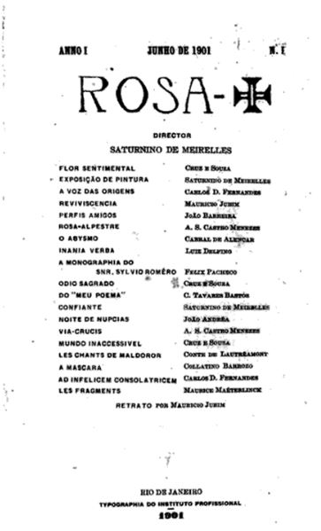 Capa da primeira edição da Revista Rosa-Cruz, publicada em Janeiro de 1901. Diretor: Saturnino de Meirelles. Obras de Cruz e Souza, Saturnino de Meirelles, Carlos D. Fernandes, Maurício Jobim, João Barreira, Álvaro Sá de Castro Menezes, Cabral de Alencar, Luiz Delfino, Félix Pacheco, C. Tavares Bastos, João Andréa, Conte de Lautrêamort, Collatino Barrozo, Maurice Maéterlance e Maurício Jardim.